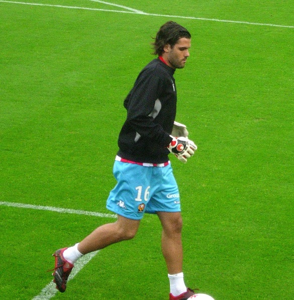 Rodolphe Roche au Mans